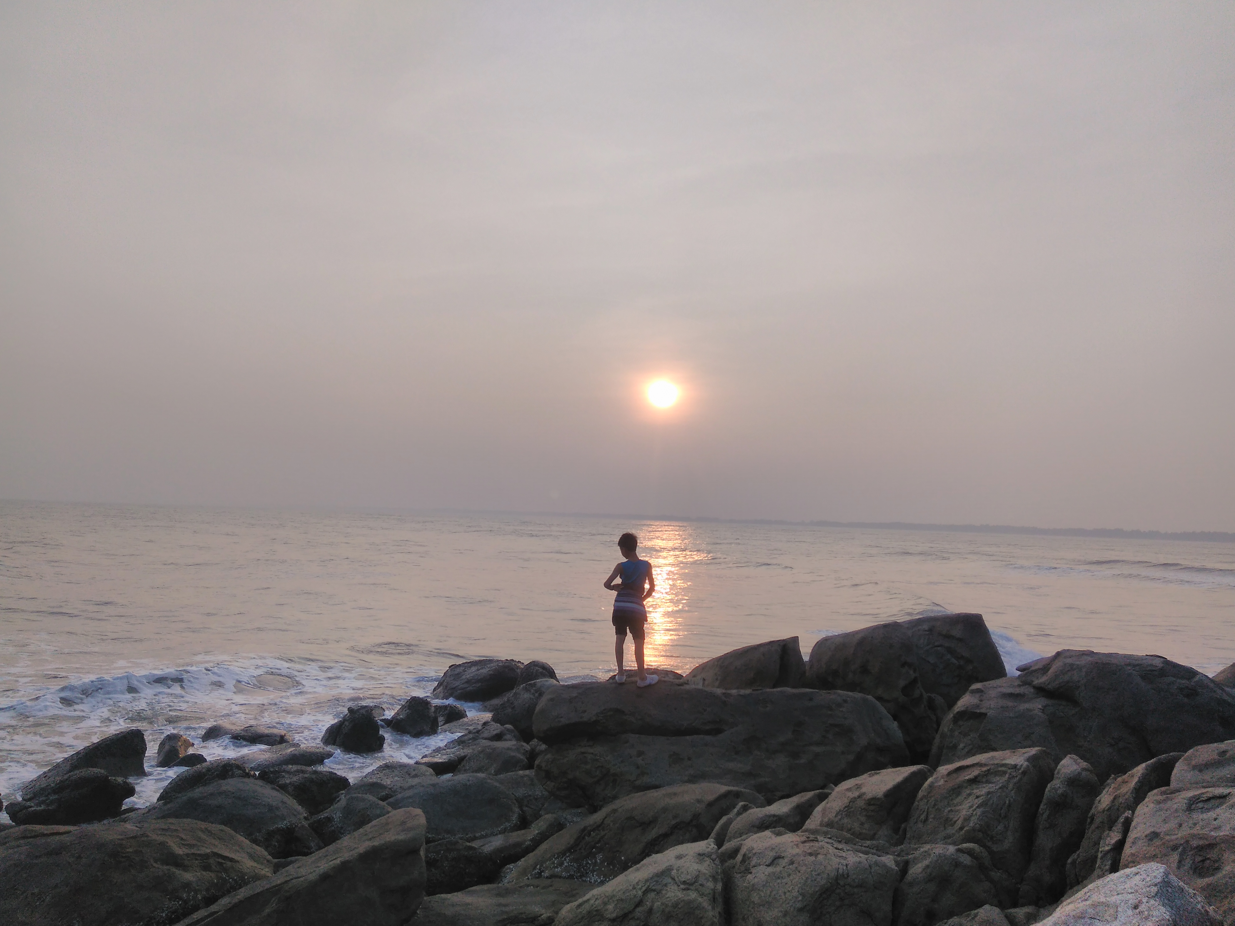 Ảnh chụp hoàng hôn tại núi Trường Lệ - Sầm Sơn - Thanh Hóa